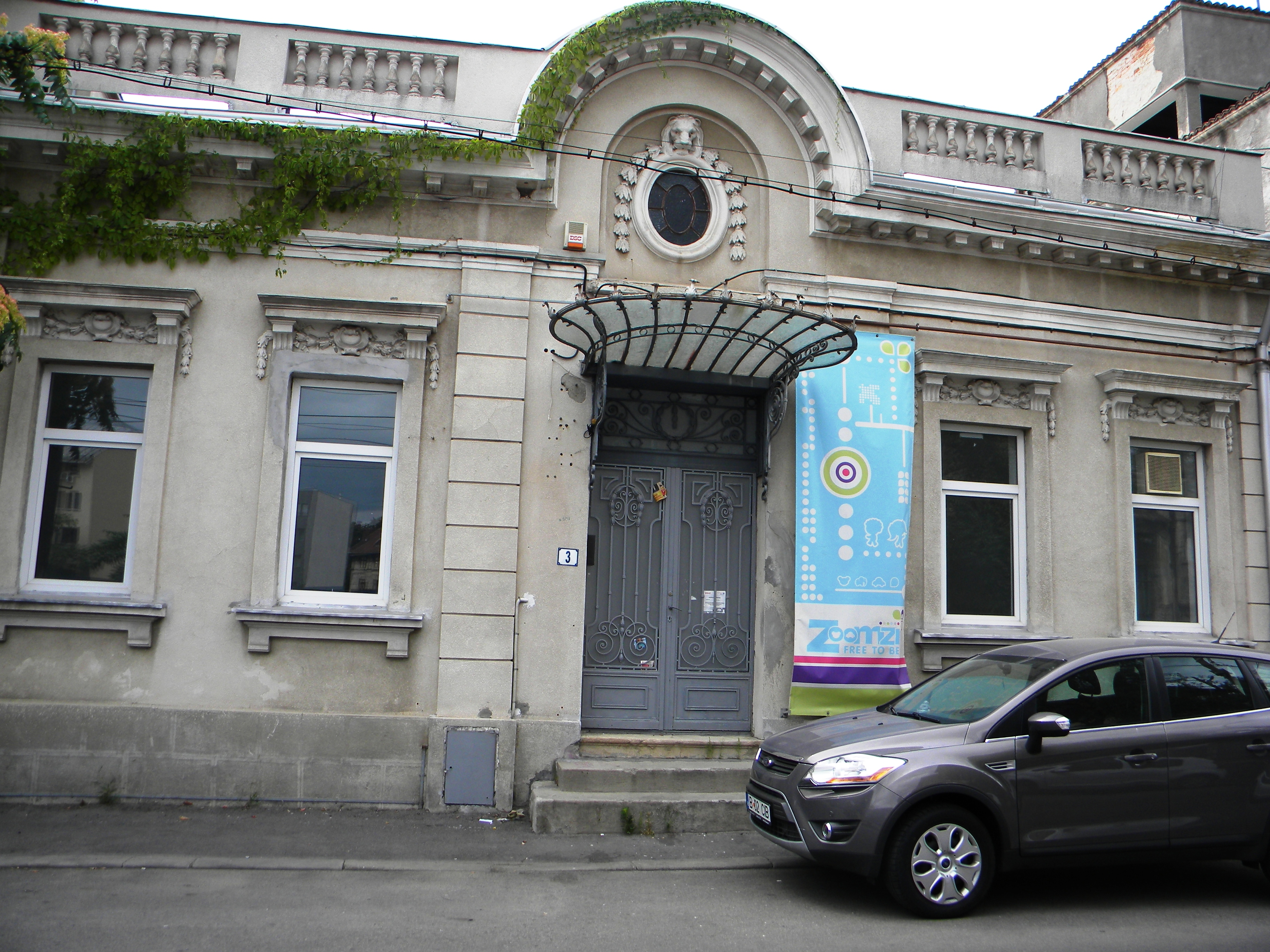 Bucuresti, Romania, Casa pe Str. Vasile Alecsandri nr. 3; B-II-m-B-17939